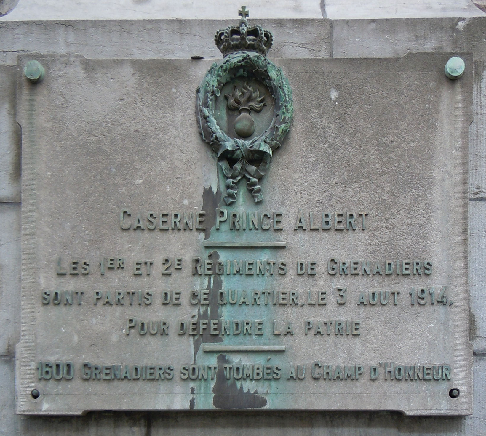 Herdenking Grendadiers